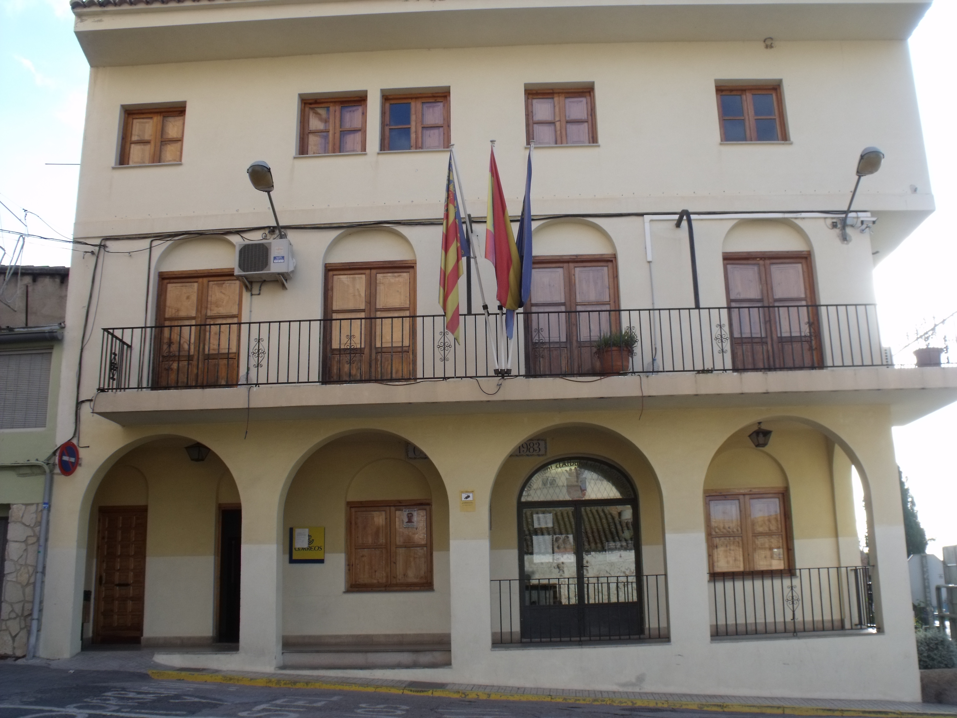 Ayuntamiento de Albalat dels Tarongers.